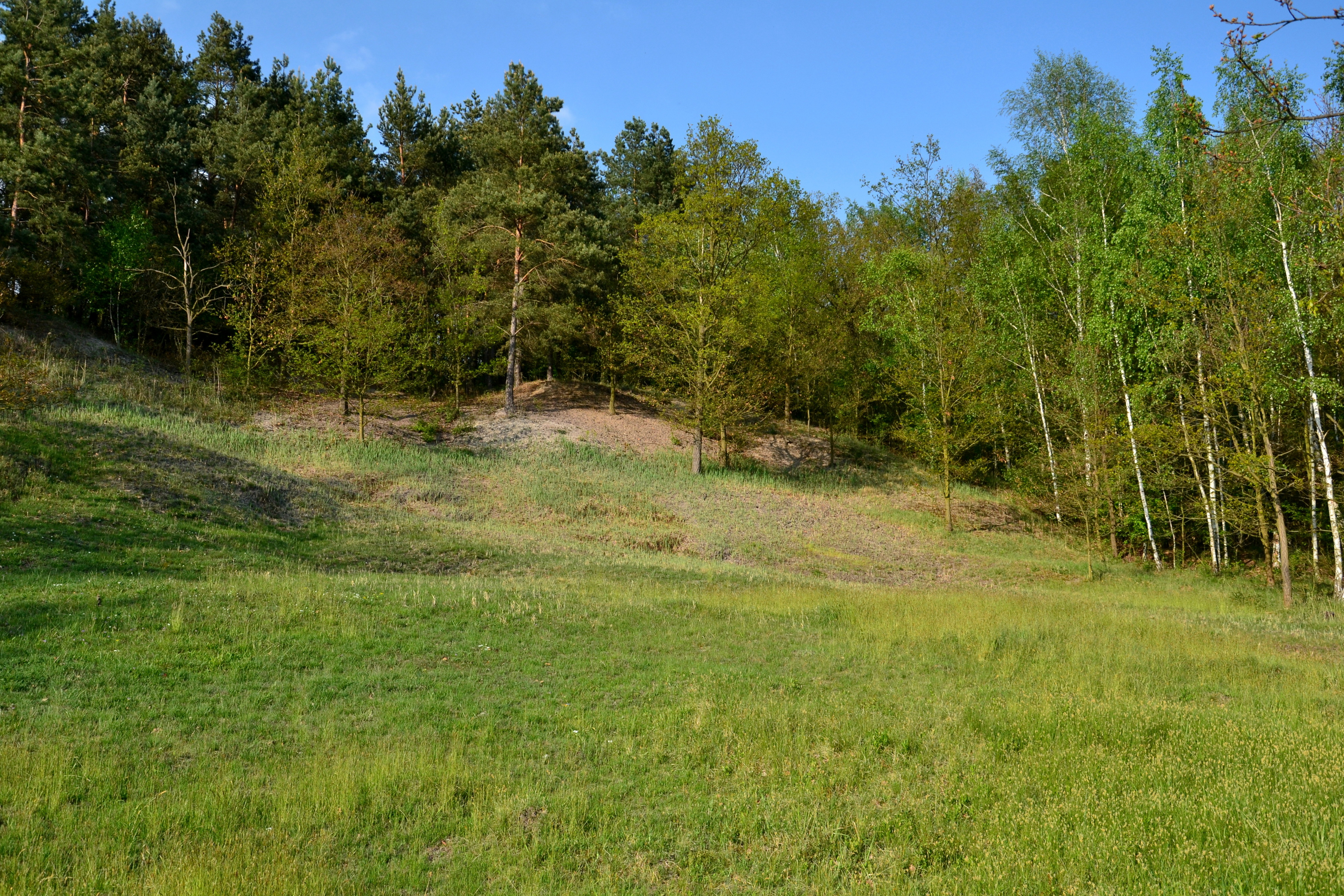 Východní část přírodní památky Slanisko u Škrle